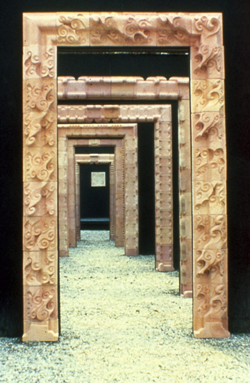 Portali